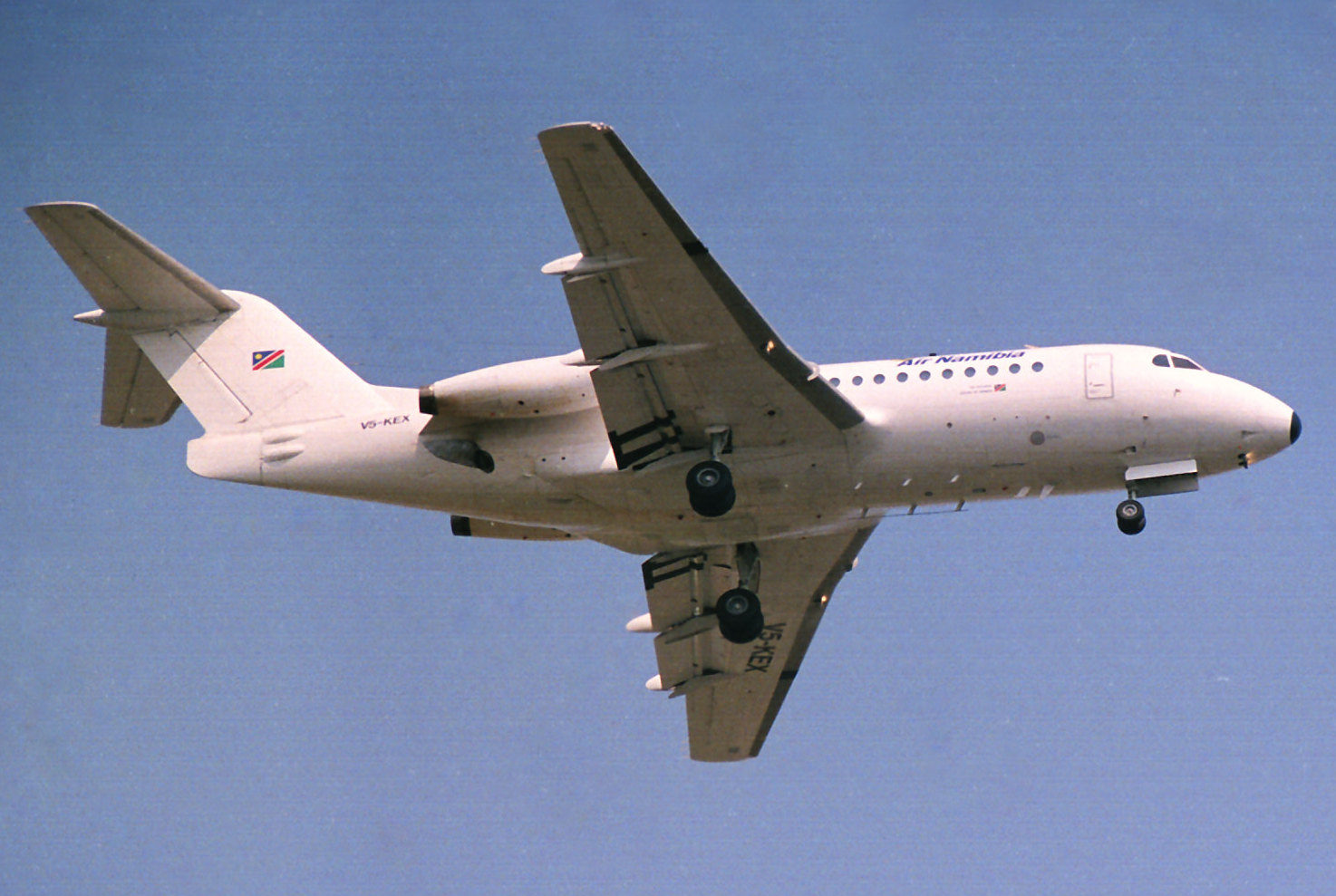 Air Namibia F28-3000 V5-KEX